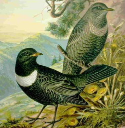 Turdus torquatus en